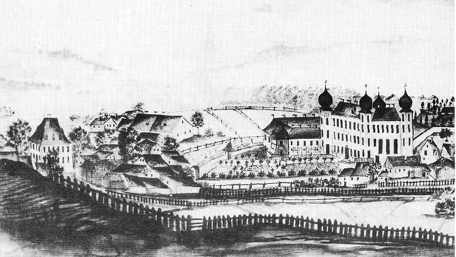 Hofmark Pirkensee, Ausschnitt aus einer Federzeichnung von Georg_Hämmerl (1770-1838)